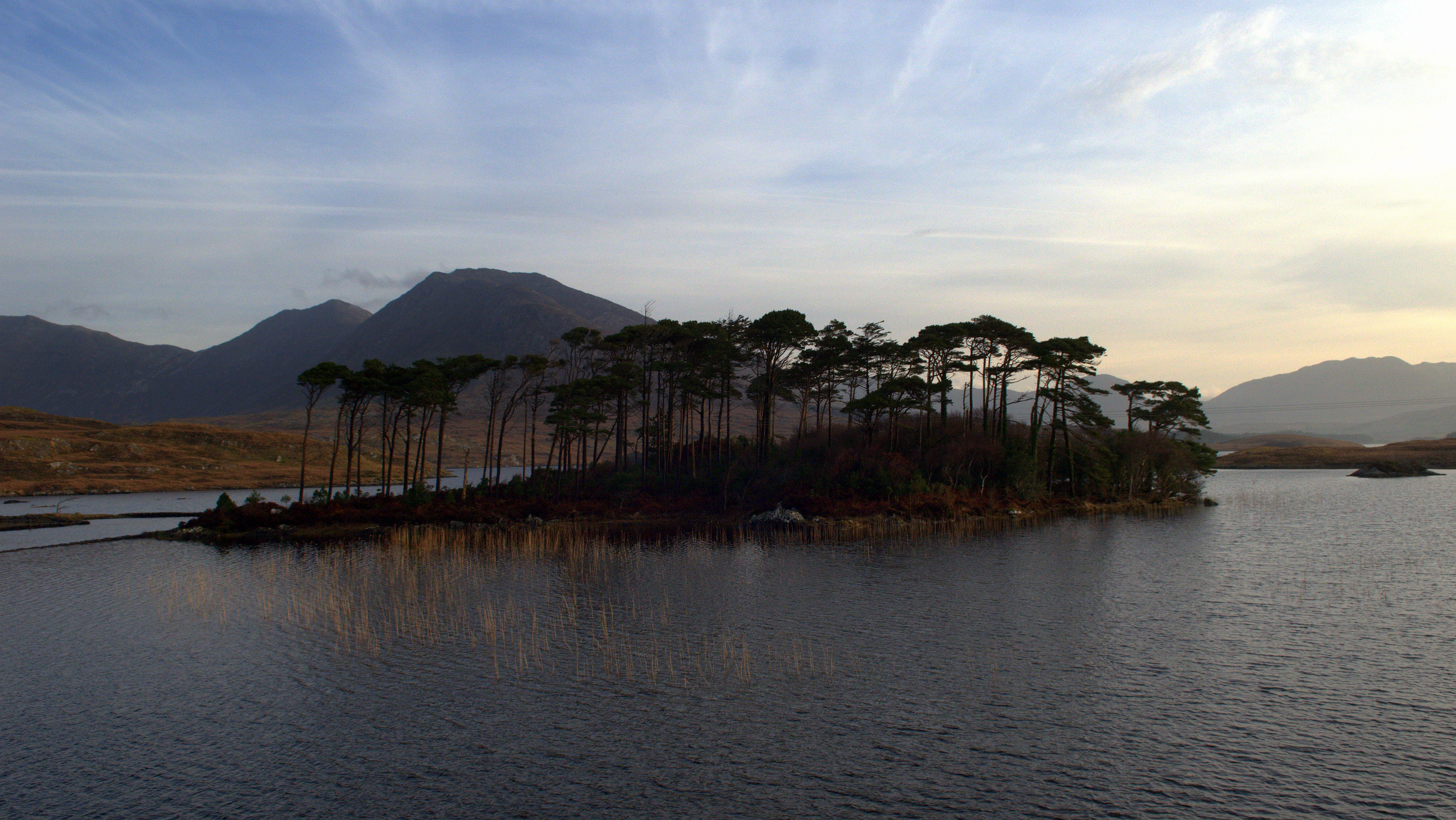 Connemara